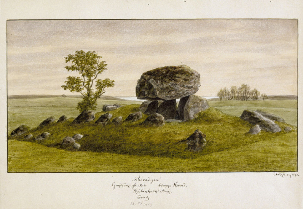 Akvarel af "Thoradyssen" af A.P. Madsen, 1890